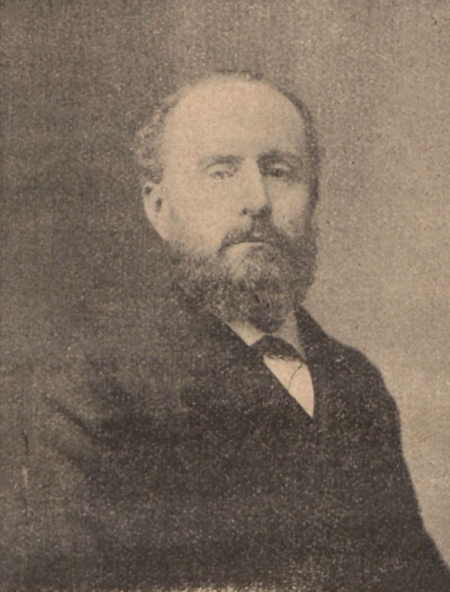 "Longnon, de l'Institut, chevalier de la Légion d'honneur, membre de la Patrie Française".